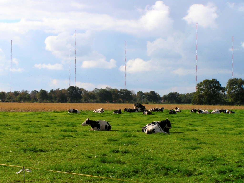 Marinesender DHO38 – Längstwellensender der Marine der Bundeswehr, in der Nähe von Saterland-Ramsloh im Landkreis Cloppenburg (Niedersachsen); gelegen im Naturschutzgebiet „Esterweger Dose“